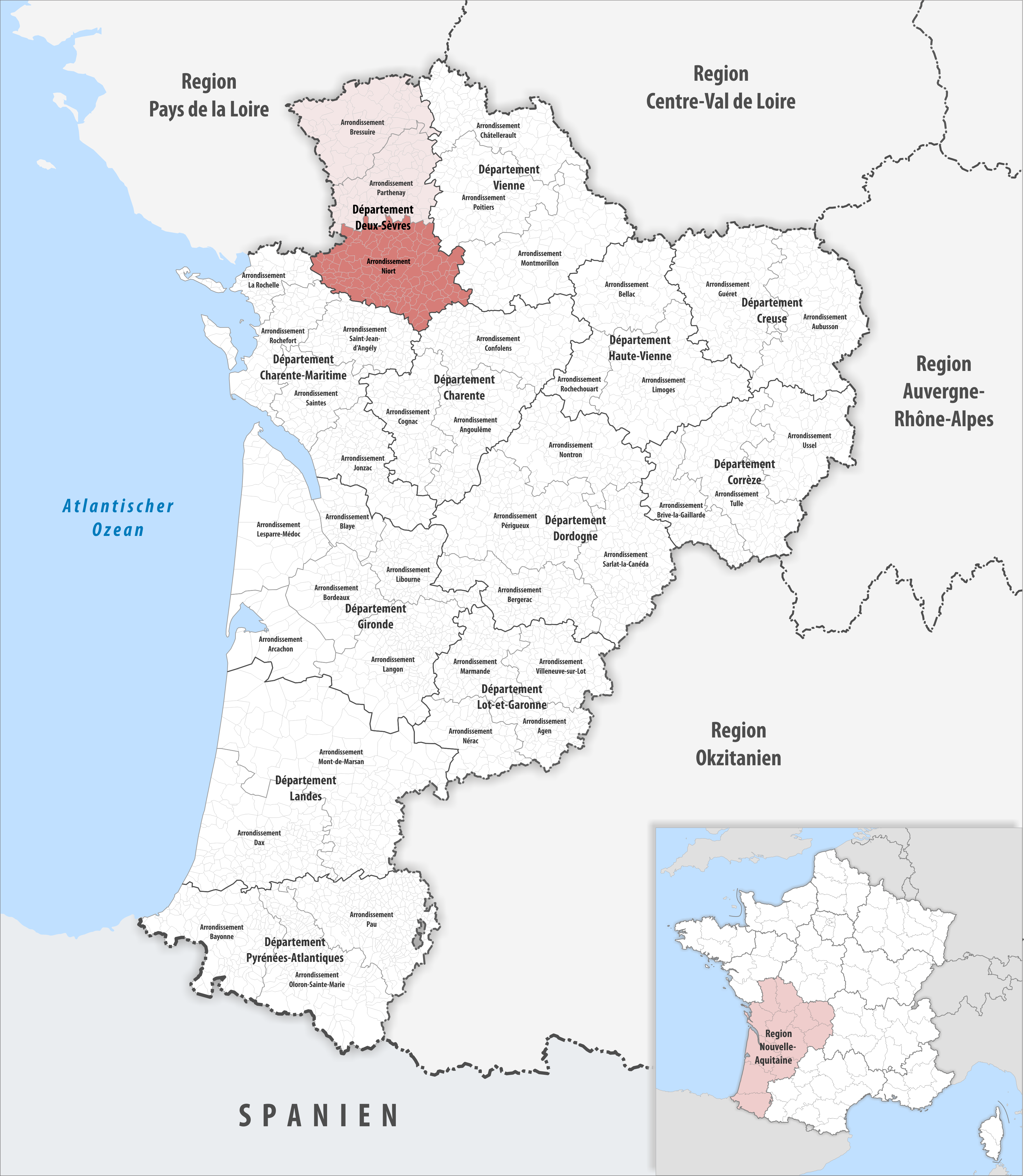 Lage des Arrondissements Niort